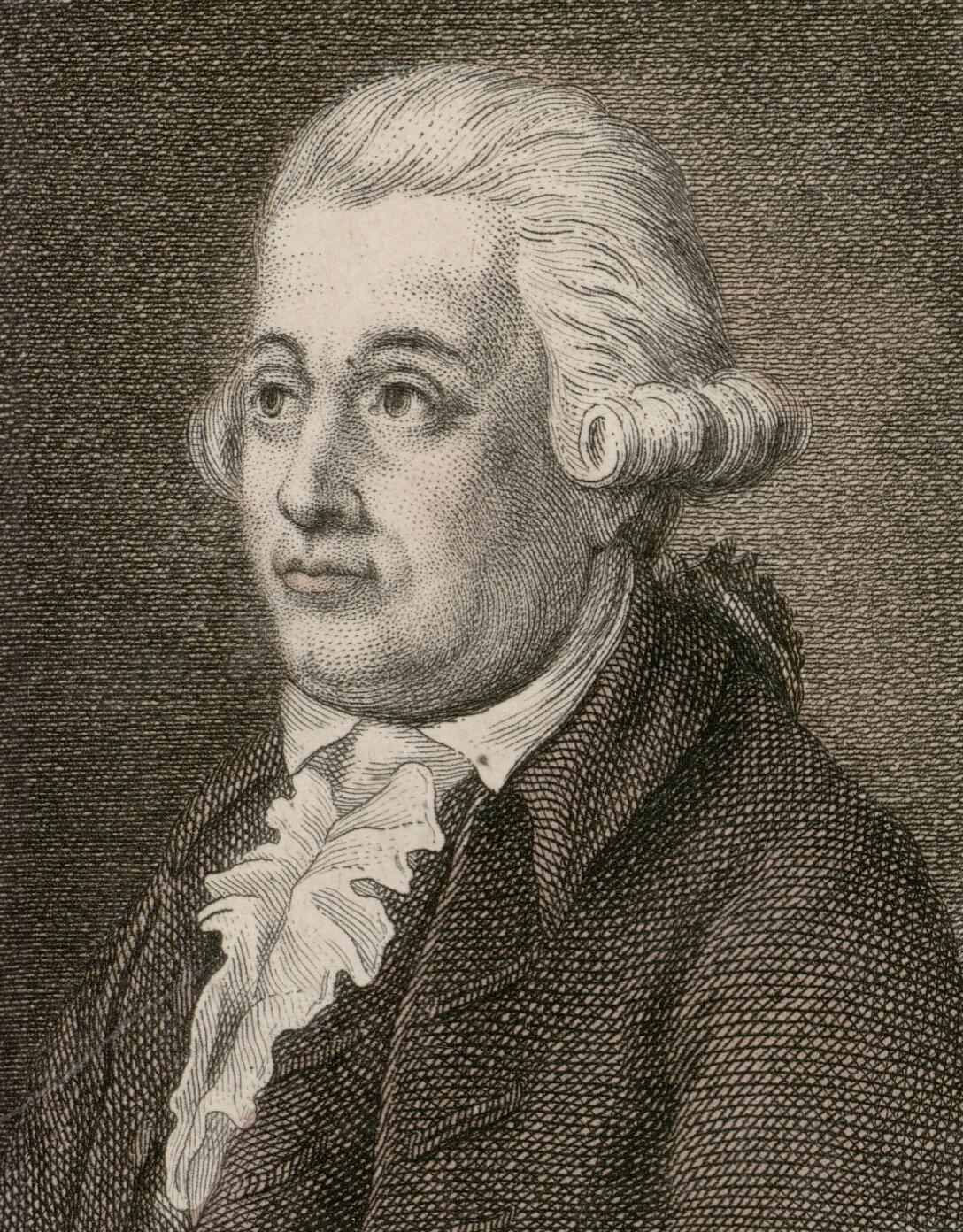 Court Lambertus van Beyma (1753-1820)